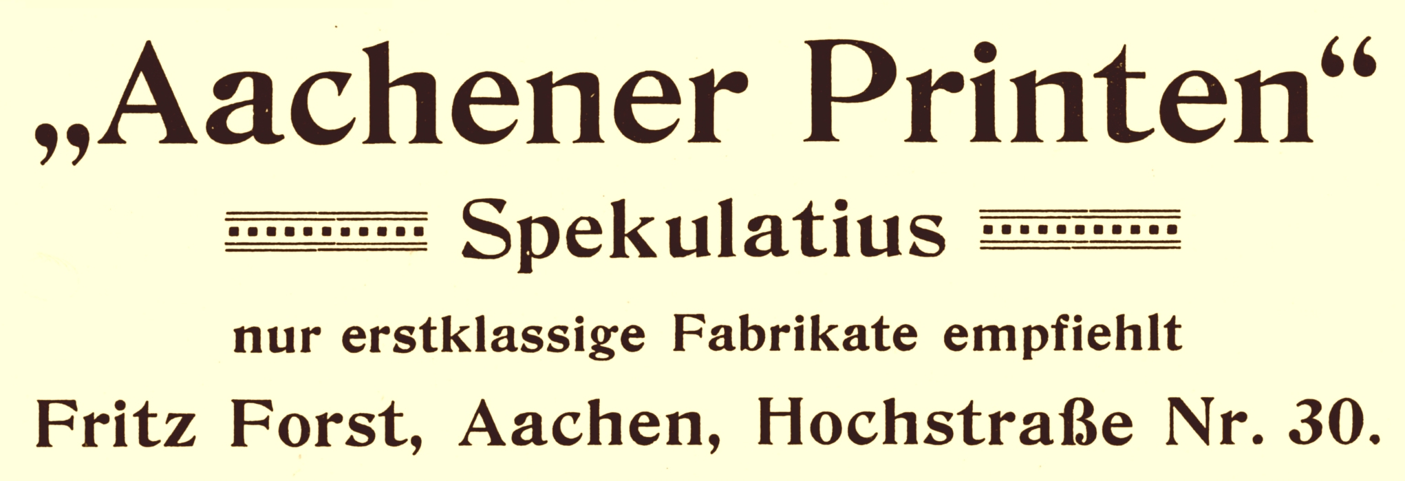 Reklame für Printen der Konditorei Fritz Forst aus: Deutschland -Zeitschrift für Heimatkunde und Heimatliebe - Organ für die deutschen Verkehrs-Interessen, Nr. 15, März 1912